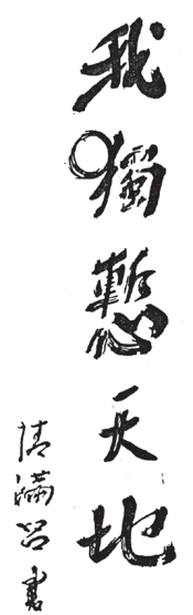 伝和気清麻呂真筆「我獨慙天地」 実際は座田維貞揮毫